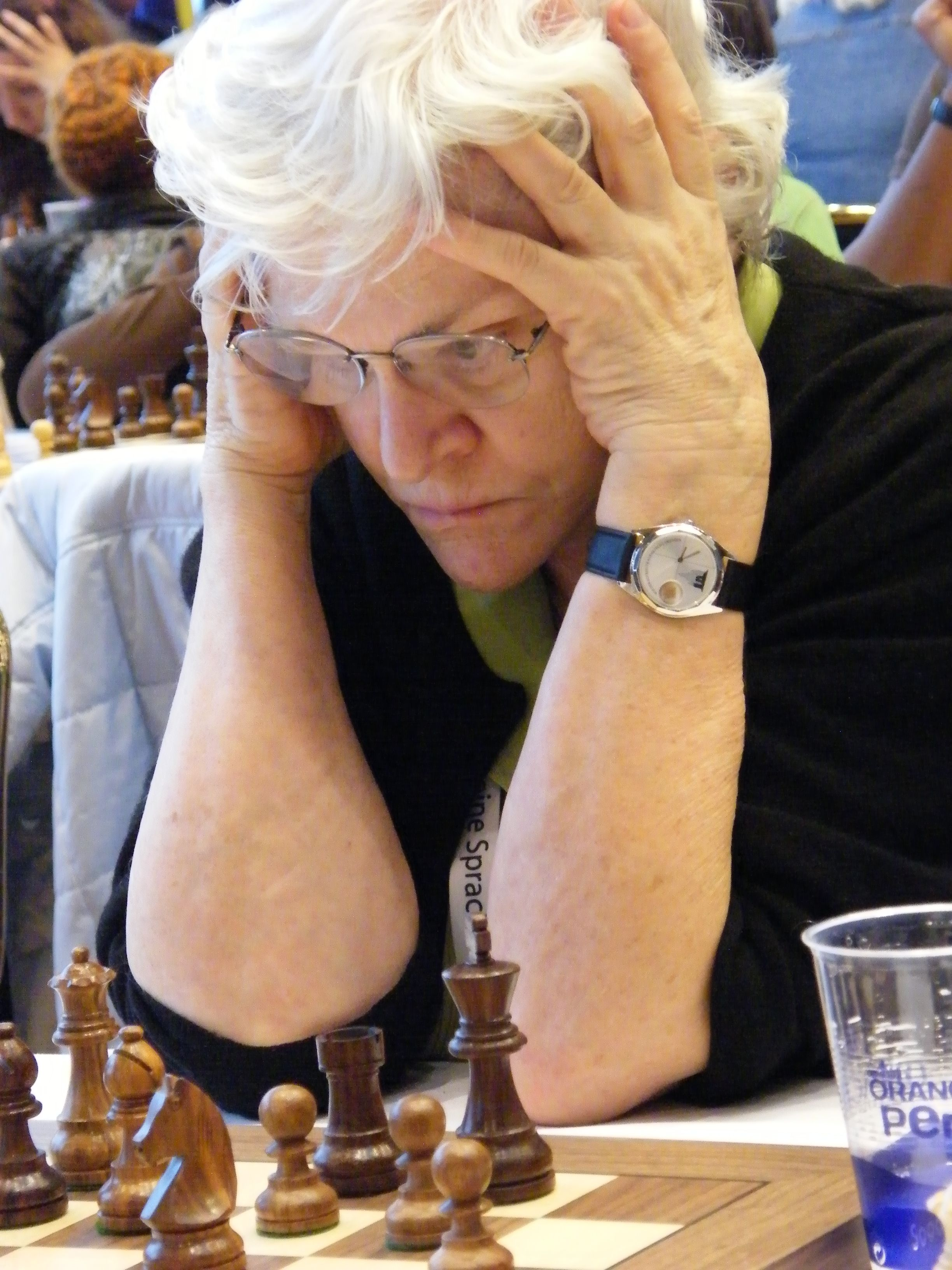 Elizabeth Shaughnessy bei der 38. Schacholympiade in Dresden 2008